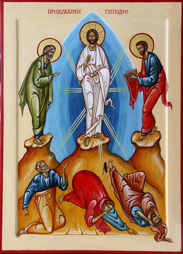 преображение